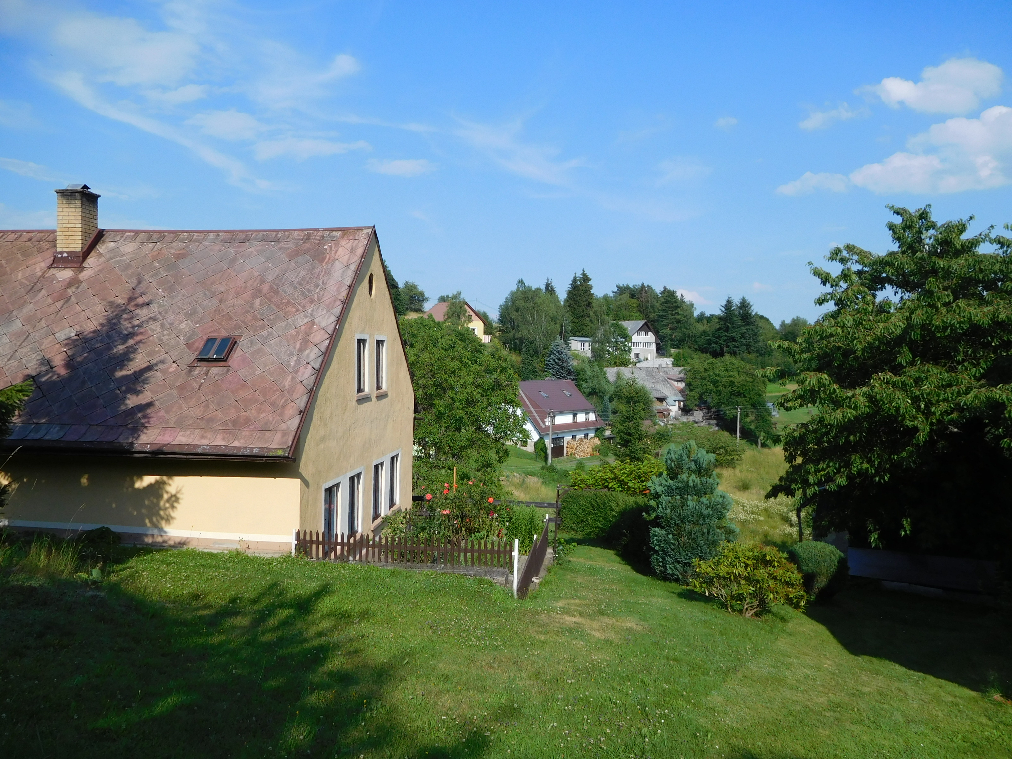 Bobov - celkový pohled od JV (v popředí č.p. 462)